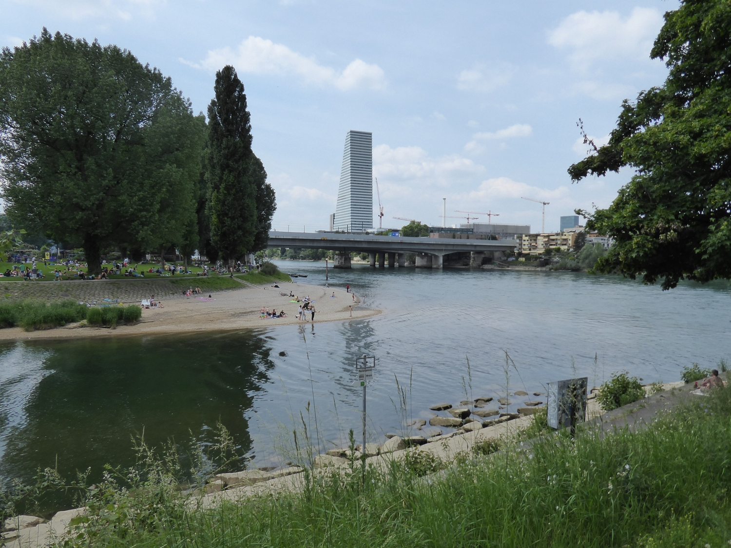 Birsköpfli, Birsfelden, Schweiz